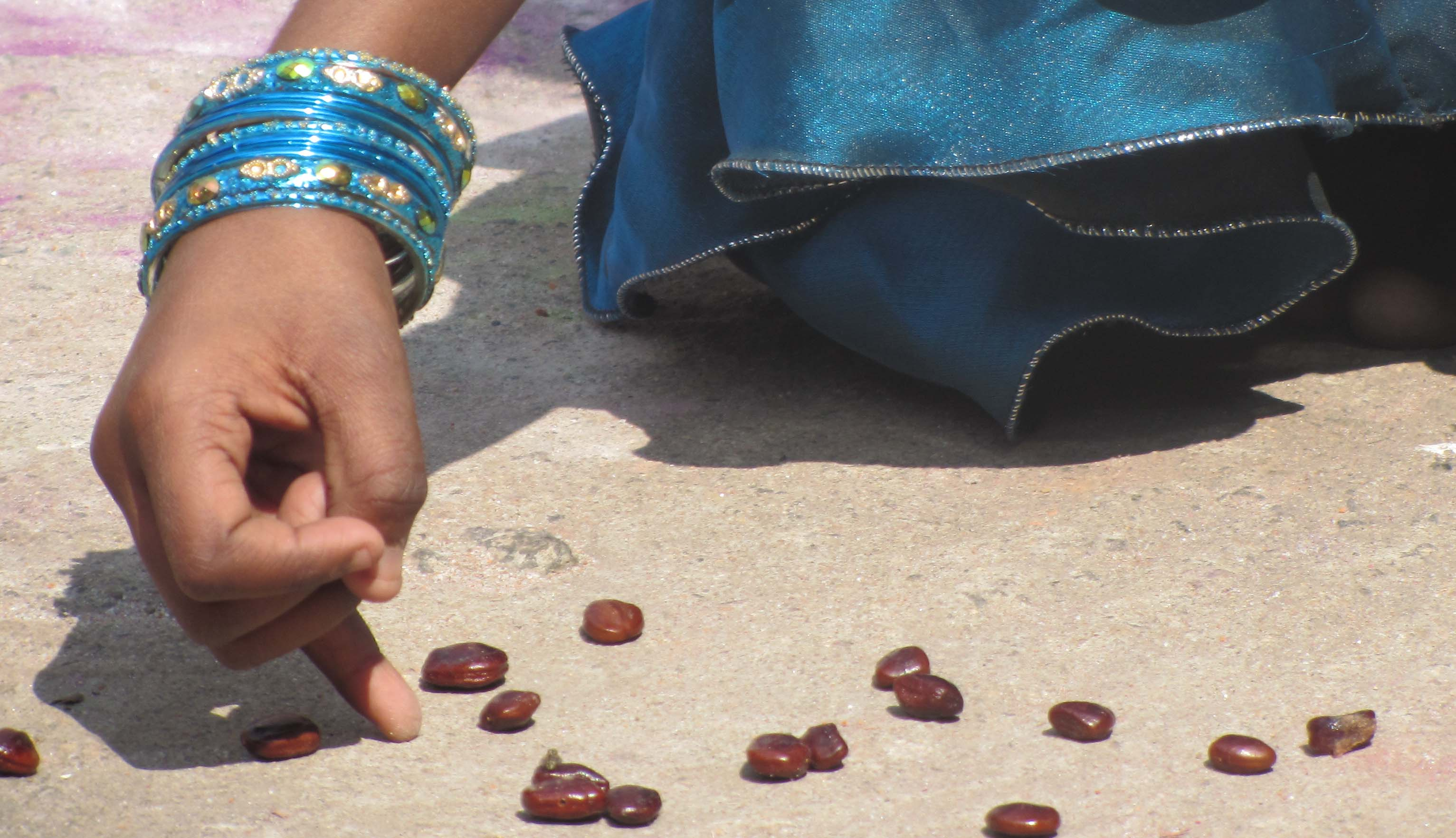 சுண்டு முத்து விளையாட்டில் புளிய முத்துகளைக் கீந்துதல் - own shot